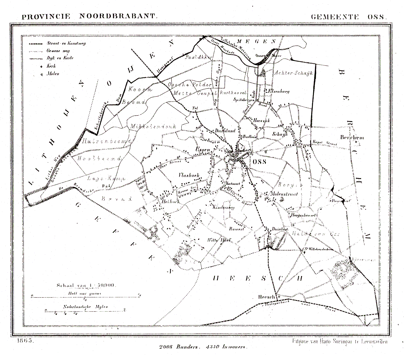 Nederland, Noord-Brabant, Gemeente Oss